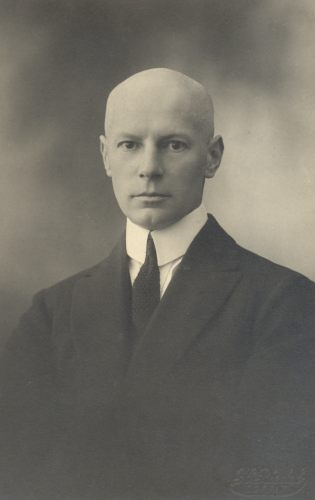 Paul Mielberg, Eesti arhitekt